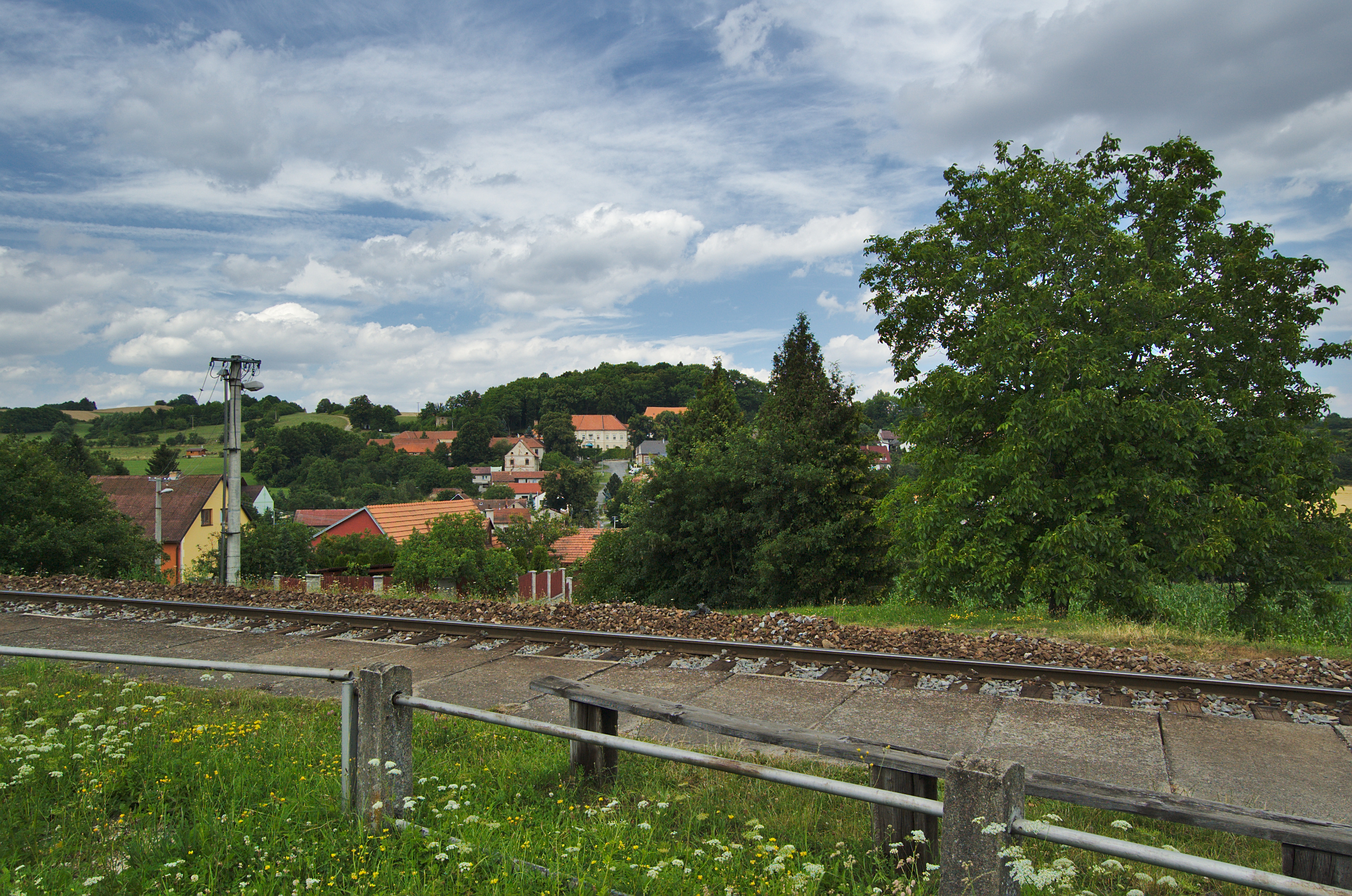 Pohled na Jesenec od vlakové zastávky, okres Prostějov